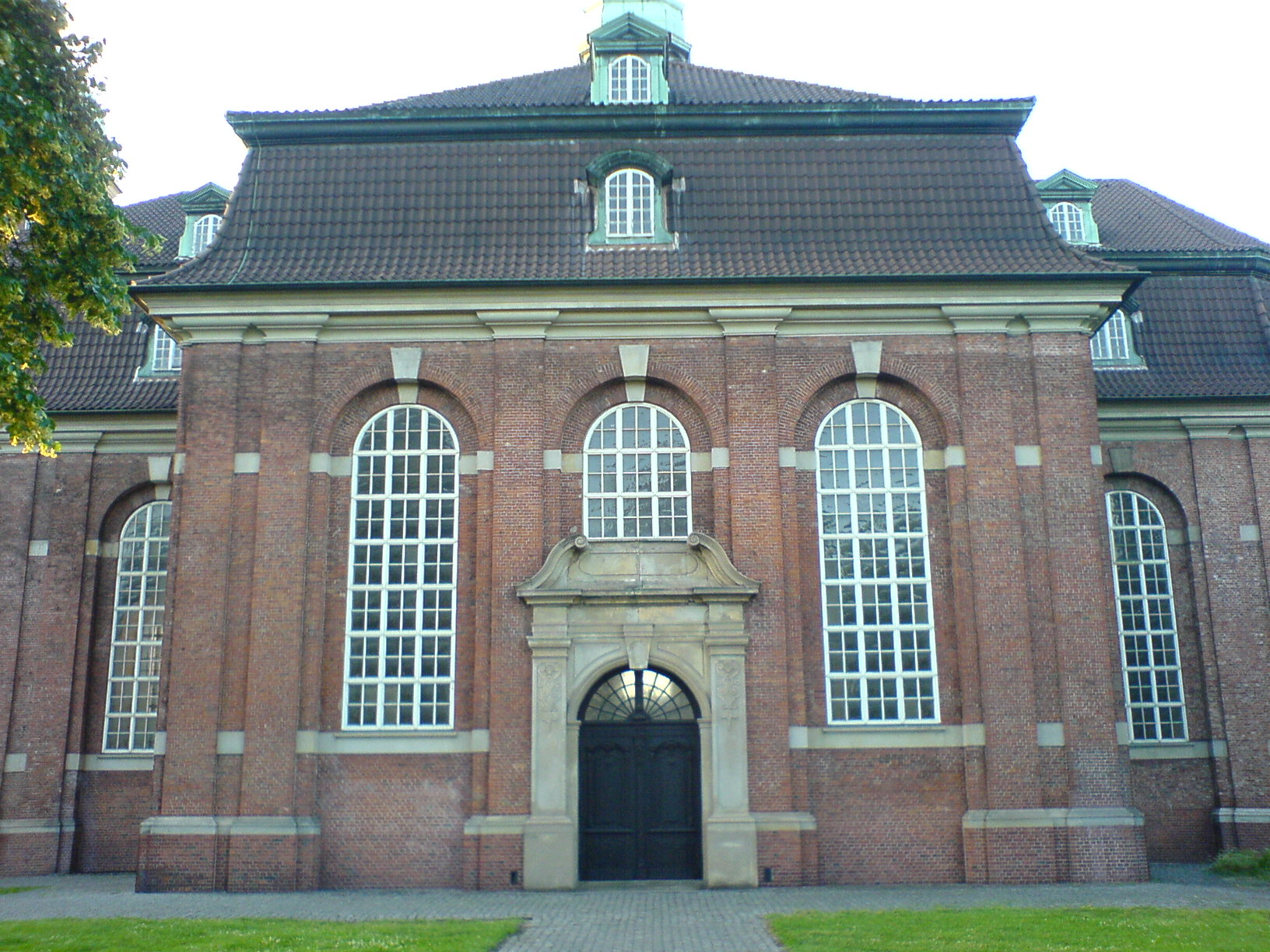 Querhaus der St. Trinitatis-Kirche in der Altonaer Altstadt Süd. This is a photograph of an architectural monument. Fotograf/Zeichner: PodracerHH 20:19, 29. Jun 2006 (CEST) Datum: 062006